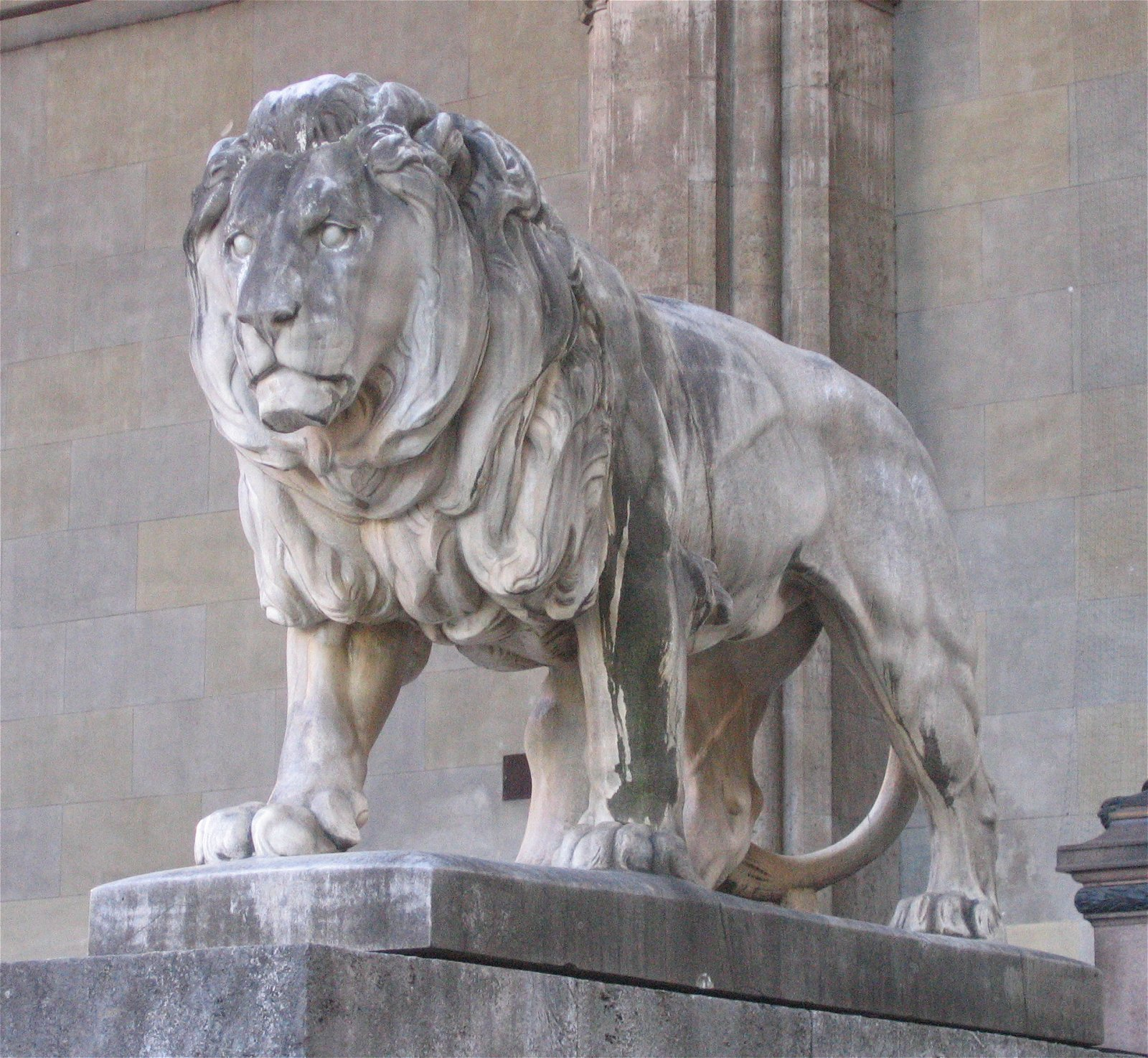 Löwe an der Feldherrnhalle in München, Wilhelm von Rümann, 1906